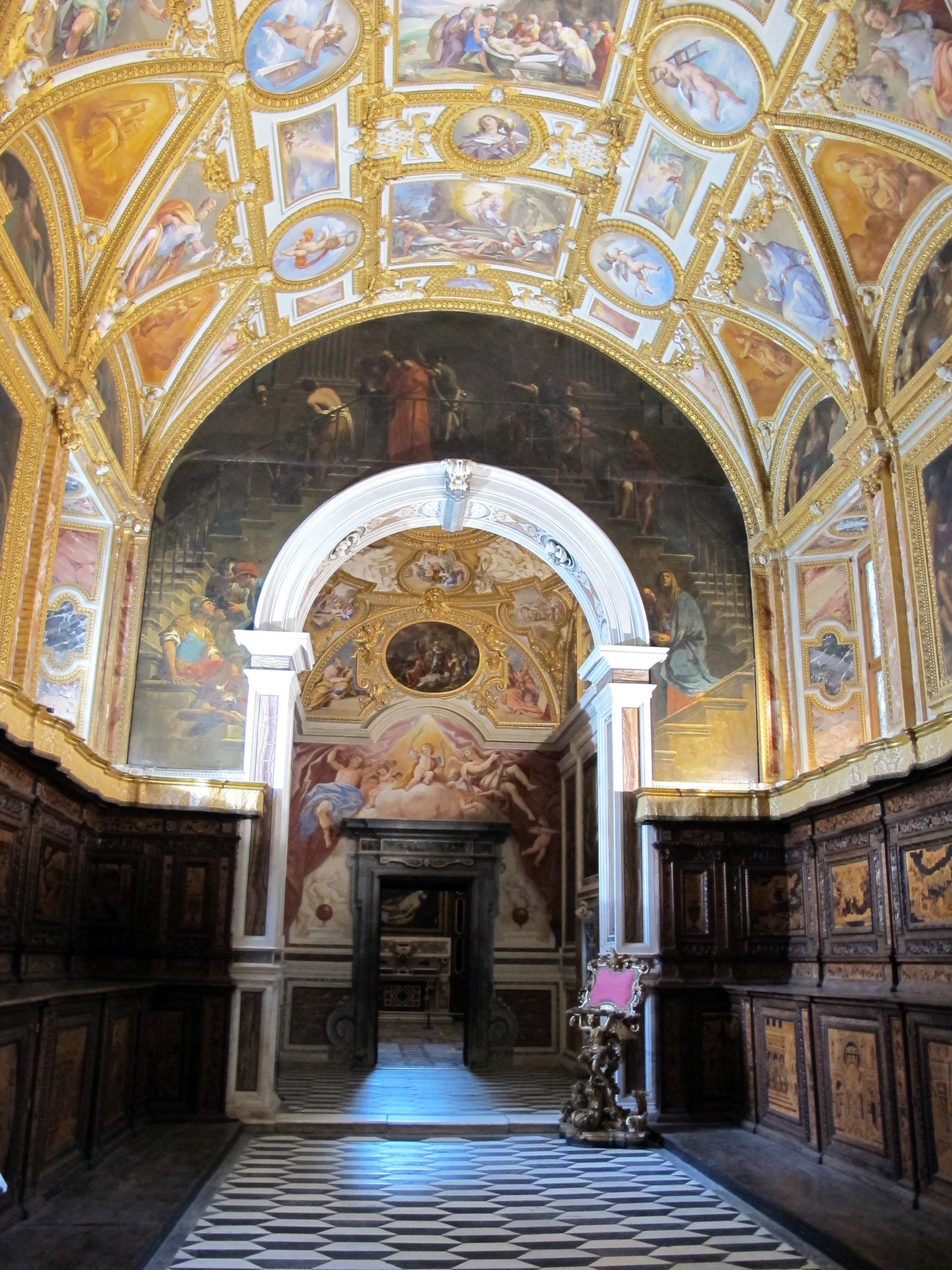 Certosa di San Martino (Napoli)